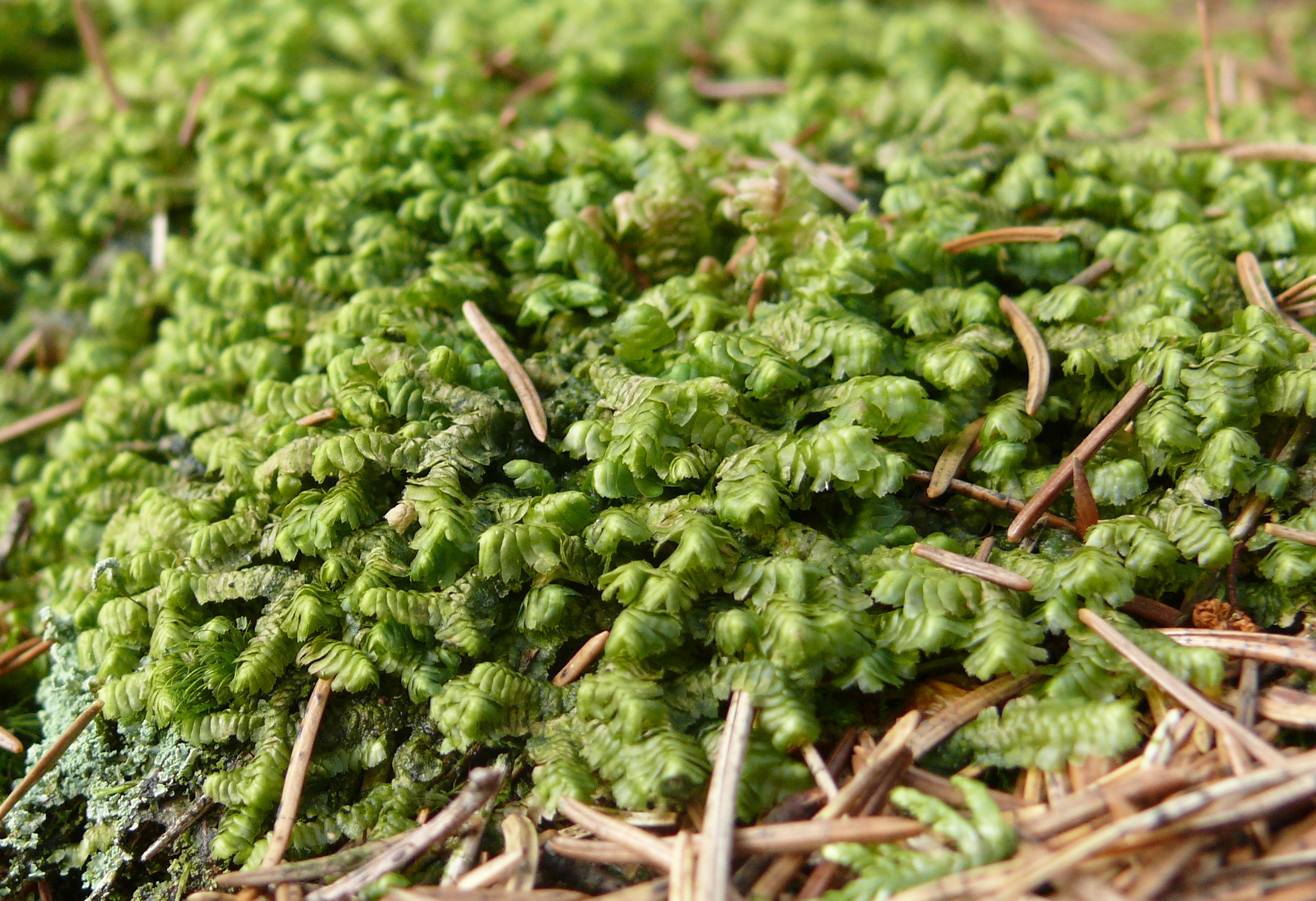 Bazzania trilobata, Virngrund, Germany